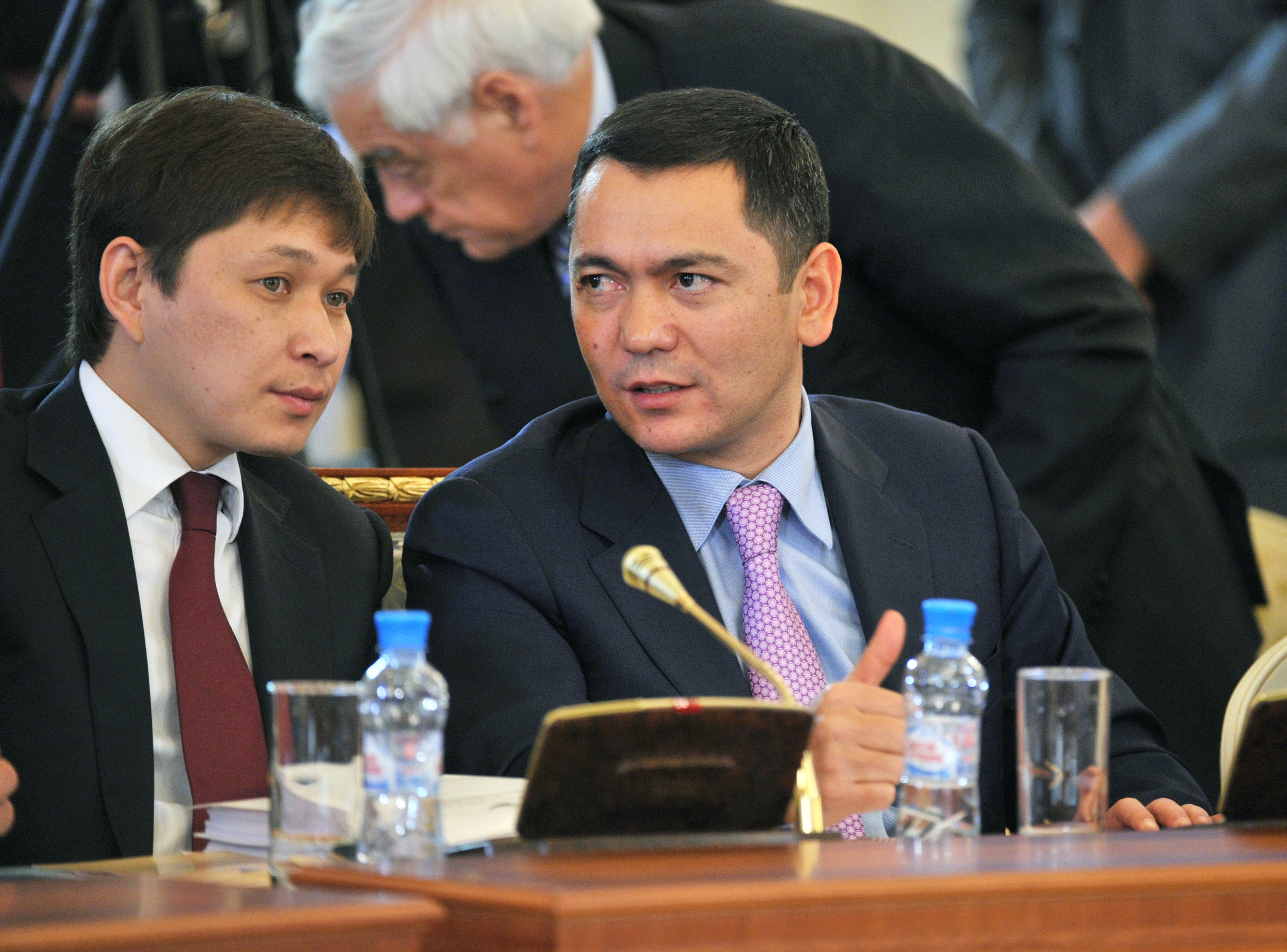 Исполняющий обязанности Премьер-министра Киргизской Республики О. Т. Бабанов на заседании Межгосударственного совета Евразийского экономического сообщества на уровне глав правительств